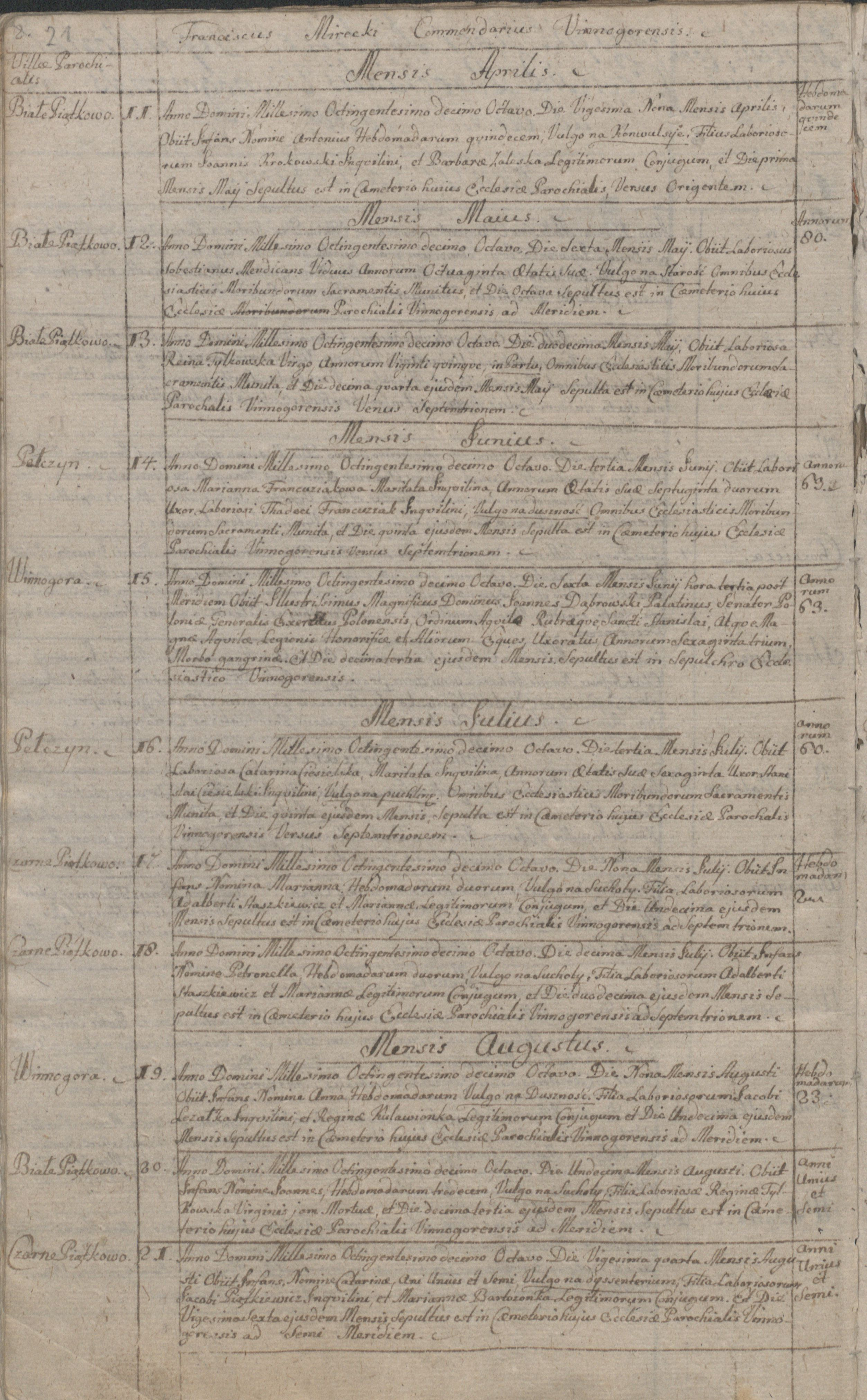 numer 5